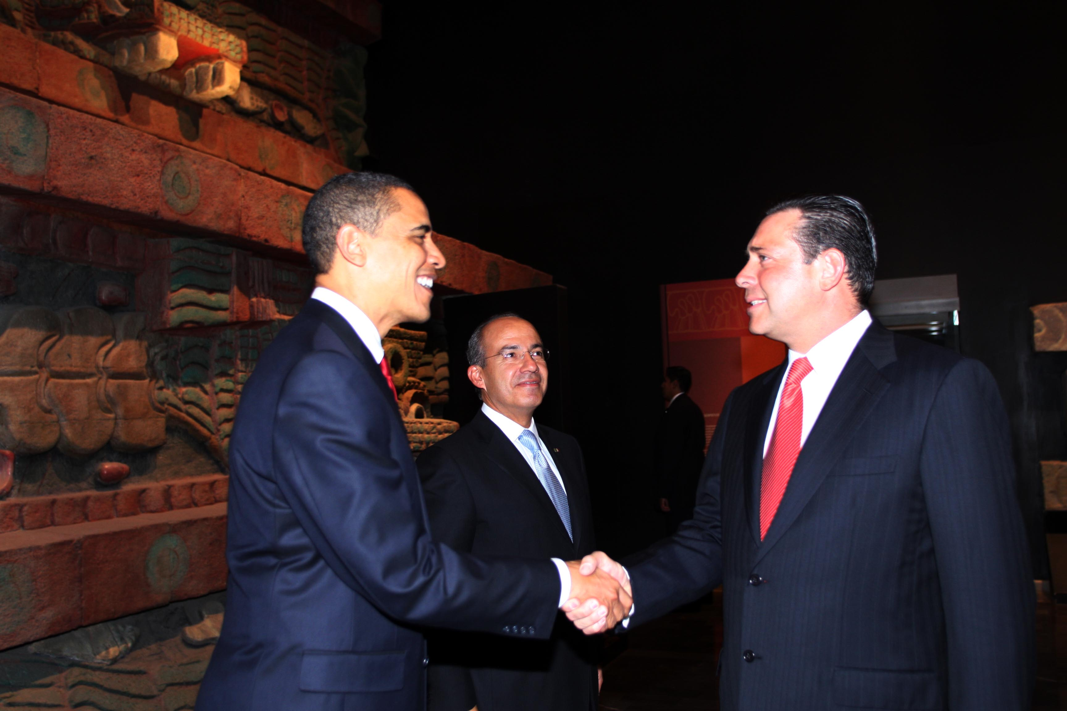 En una histórica cena, el Gobernador Eugenio Hernández Flores presentó al Presidente de Estados Unidos, Barack Obama, los saludos del pueblo tamaulipeco y confirmó la suma de esfuerzos de su administración con el Presidente Felipe Calderón para fortalecer los lazos diplomáticos, comerciales y de amistad con el vecino país. A este cordial encuentro sin precedente asistieron sólo cien personalidades de México, entre gobernadores, empresarios, dirigentes sindicales y figuras del arte y la cultura.